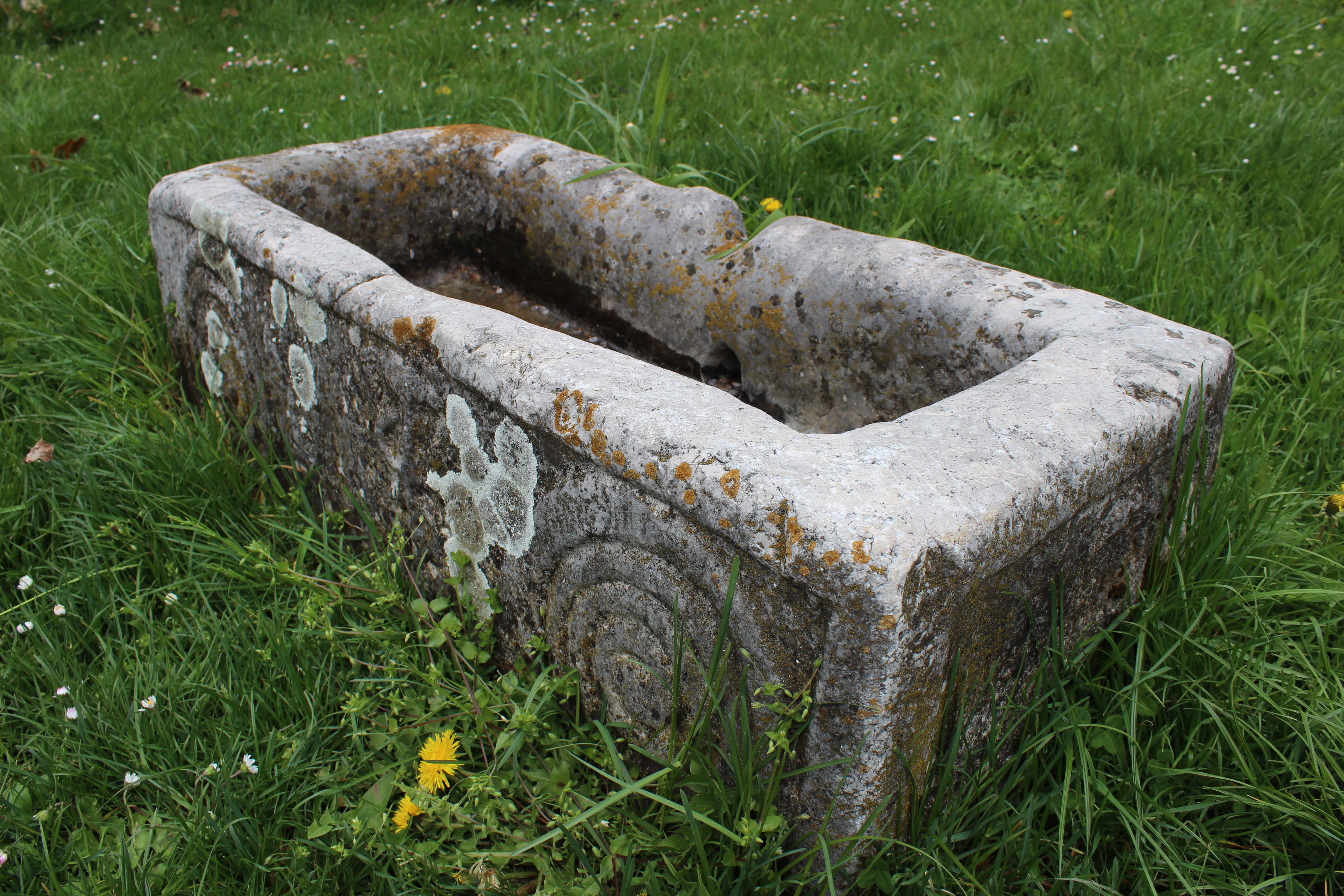 Ostaci rimskog urbanog naselja u Rogatici.